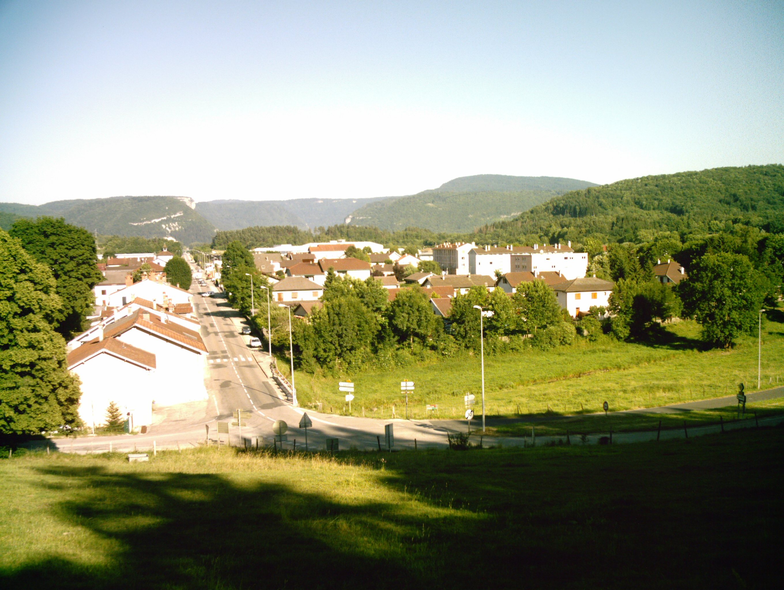 Village de Nurieux-Volognat (pris depuis la montée du Berthiand)